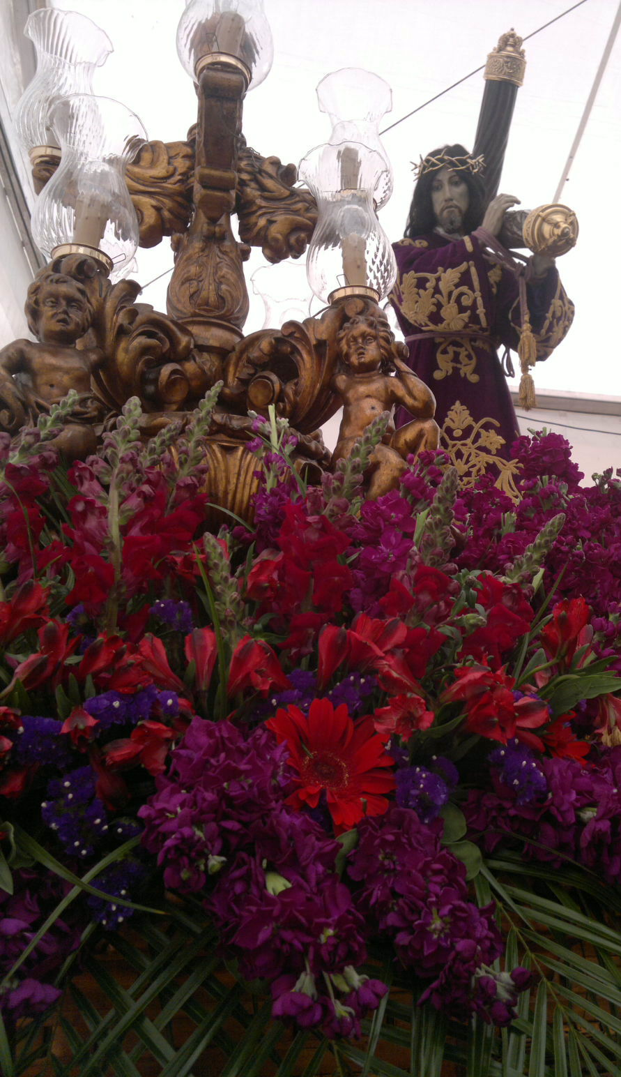 Detalle arreglo florar trono Stmo. Cristo del Perdón